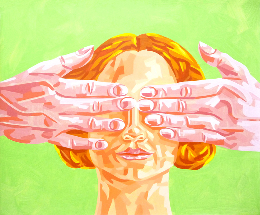 Rissa, Das Geheimnis, 1966, Öl auf Leinen, 100 x 120 cm